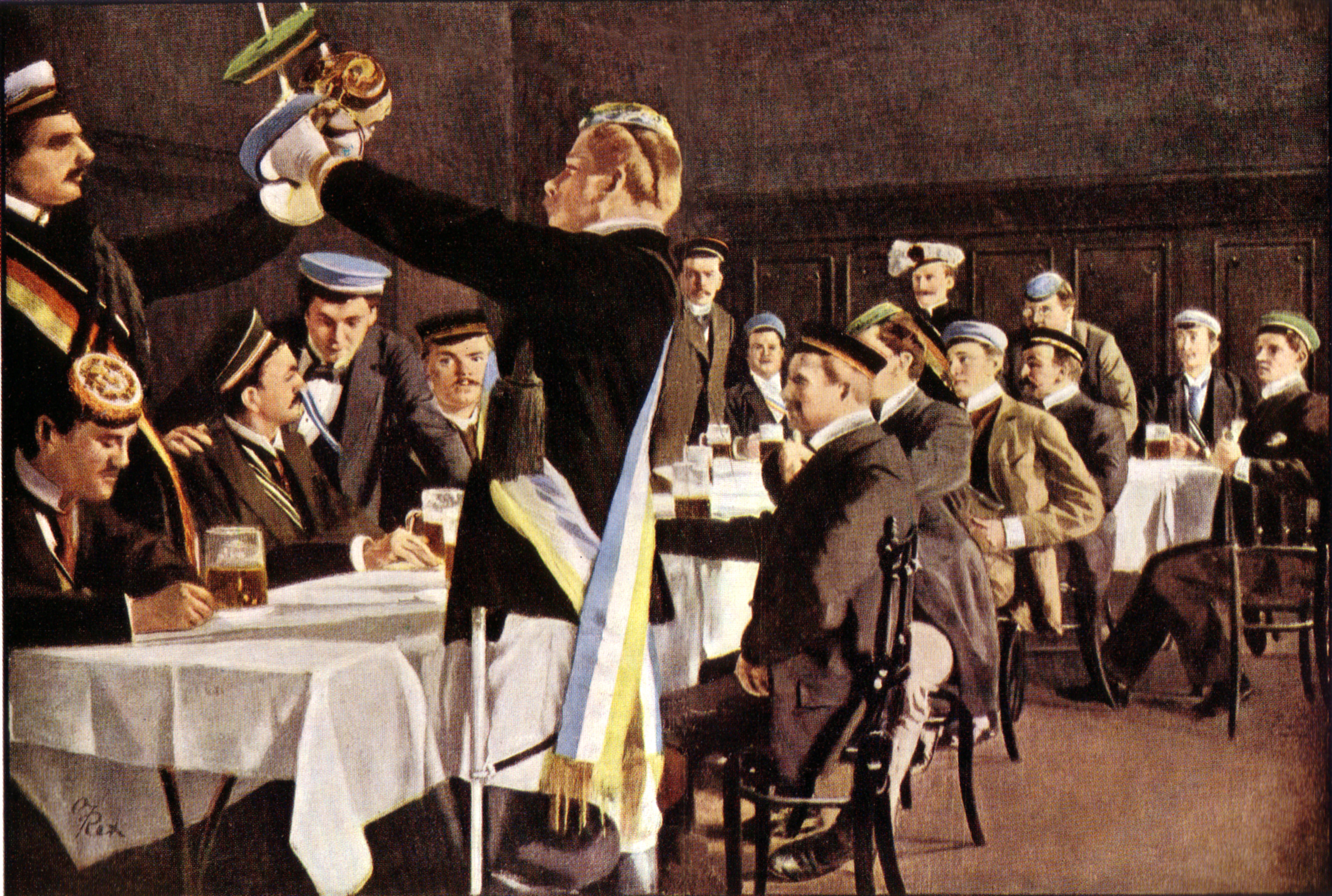 dargestellt sind: von links: F. Kunze (B! Ghibellinia, stehend), Medizinstudent ? (B! Ghibellinia, sitzend) Franz Badel (B! Constantia), * 20.01.1872 in Skalken, Medizinstudent von WS 1893/1894 bis 22.12.1900[1] Carl Hielle (S! Barden), * 03.12.1874 in Schönlinde, Jurastudent von WS 1895/1896 bis 24.07.1900[2] Alfred Wiltschko (B! Teutonia), * um 1875 in Prag, Jurastudent von WS 1894/1895 bis 08.07.1901[3] J. Zinke (B! Albia, stehend), Ingenieursstudent H. Schmidt (L! Egerländer Landtag), Ingenieursstudent Hugo Wahrlich (B! Teutonia), * 21.03.1875 in Dehlau, Medizinstudent von WS 1894/1895 bis 15.07.1907[4] A. Herzig (B! Albia), Medizinstudent A. Gangel (B! Carolina), Chemiestudent Ernst Pommerrenig (B! Ghibellinia), * 08.03.1875 in Prag, Medizinstudent von WS 1894/1895 bis 12.06.1900[5] Rudolf Ritter Lodgman von Auen (S! Barden), * 21.12.1877 in Königgrätz, Jurastudent vom WS 1895/1896 bis 08.02.1901[6] Adolf von Schnée (B! Albia), * 22.12.1874 in Dresden, Medizinstudent vom WS 1894/1895 bis 31.05.1902[7] Ernst Walther (B! Thessalia), * 12.01.1872 in Teplitz , Medizinstudent von WS 1892/1893 bis 24.02.1900[8] T. Tschek (B! Arminia), Technikstudent Arthur Kapaun (B! Carolina), * 28.12.1875 in Wien, Jurastudent von WS 1895/1896 bis 18.03.1901[9]